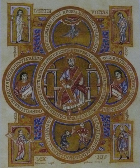 Evangeliář Jindřicha II.